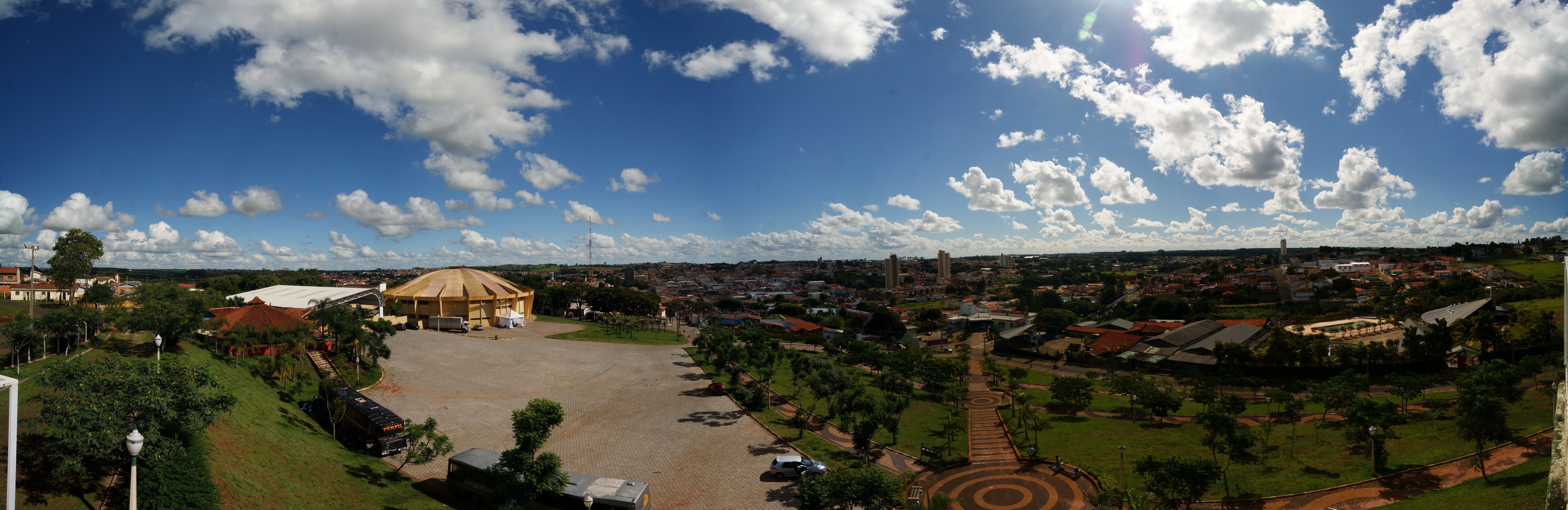 Vista parcial de Avaré, São Paulo, Brasil